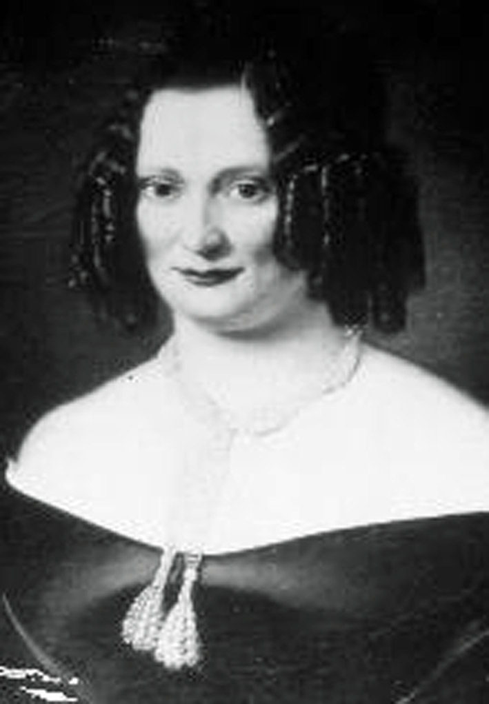 Porträt von Emilie Schmitz